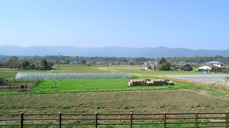 くま川鉄道湯前線ja:東多良木駅 駅周辺 ホーム上から北側を見る。 撮影者/著者/著作権保有者 : MK Products (本人がアップロード) 撮影日 : 2007/03/30 東多良木駅用にアップロードした画像です。良い画像があれば別の画像に変えてください。